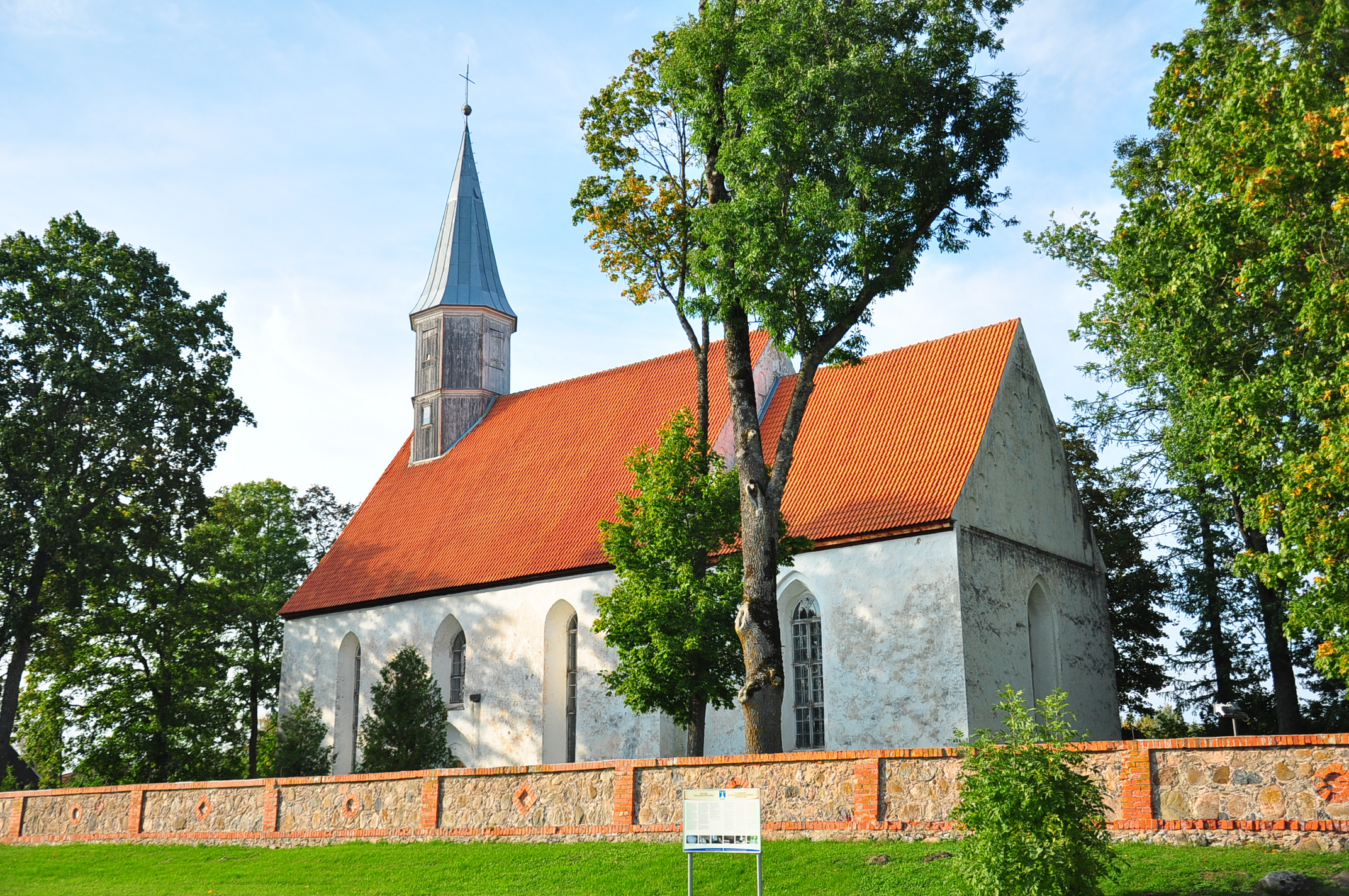 Nõo kirik